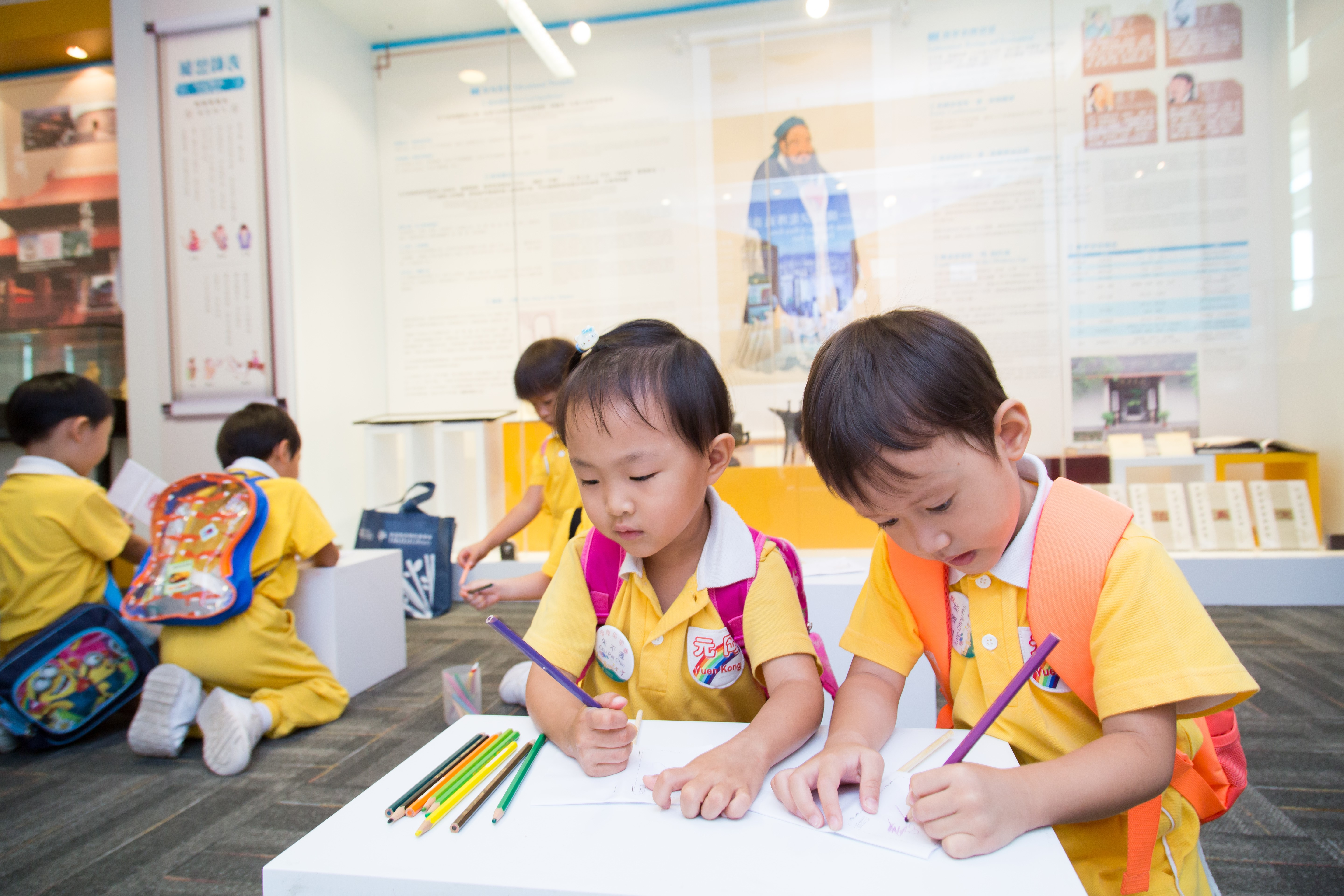 中文（香港）: 學生在進行手工